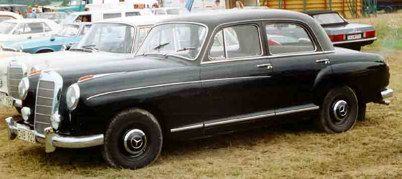 Mercedes-Benz 219 Limousine 1959